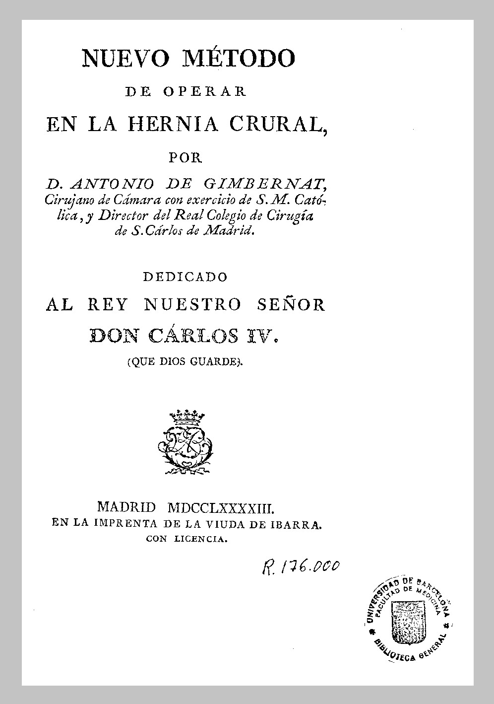 Page de titre de 'Nuevo Método de Operar en la Hernia Crurial', ouvrage de chirurgie d'Antoni Gimbernat i Arbós, 1793.